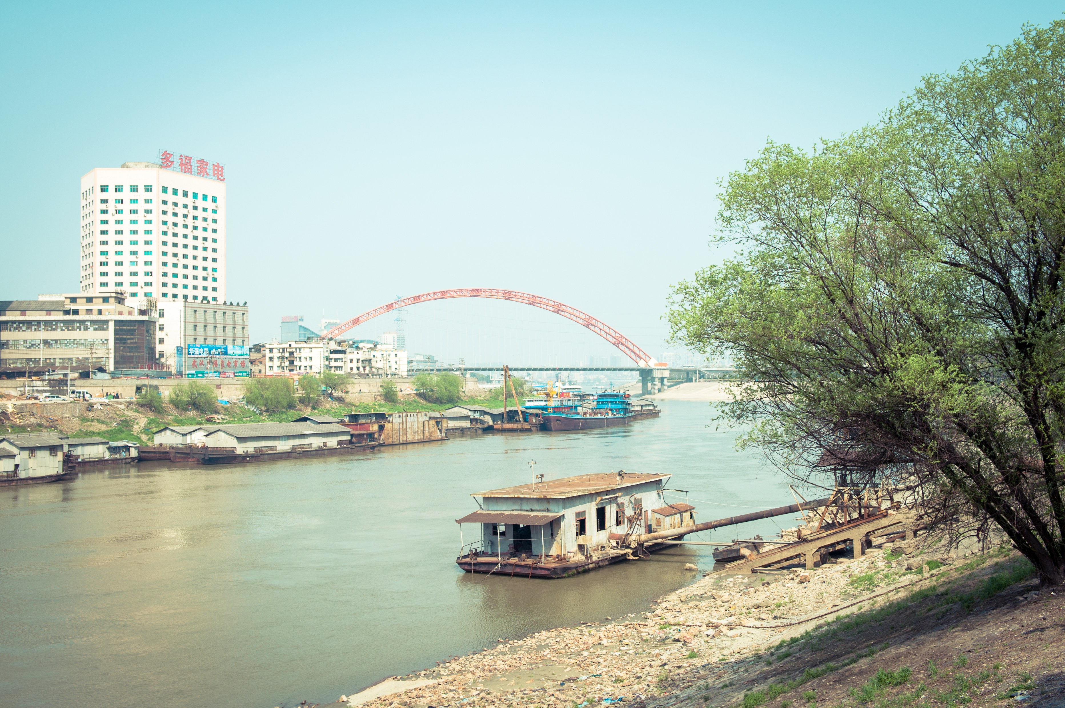 Wuhan 武汉 Han river 汉江